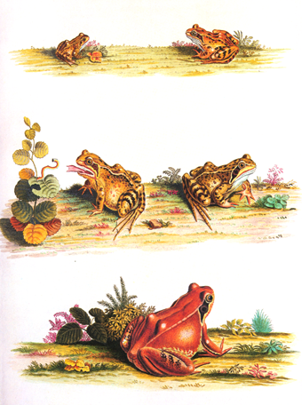 Figure III of Historia naturalis ranarum nostratium in qua omnes earum proprietates, praesertim quae ad generationem ipsarum pertinent, fusius enarrantur, Nuremberg: Johann Joseph Fleischmann, 1758